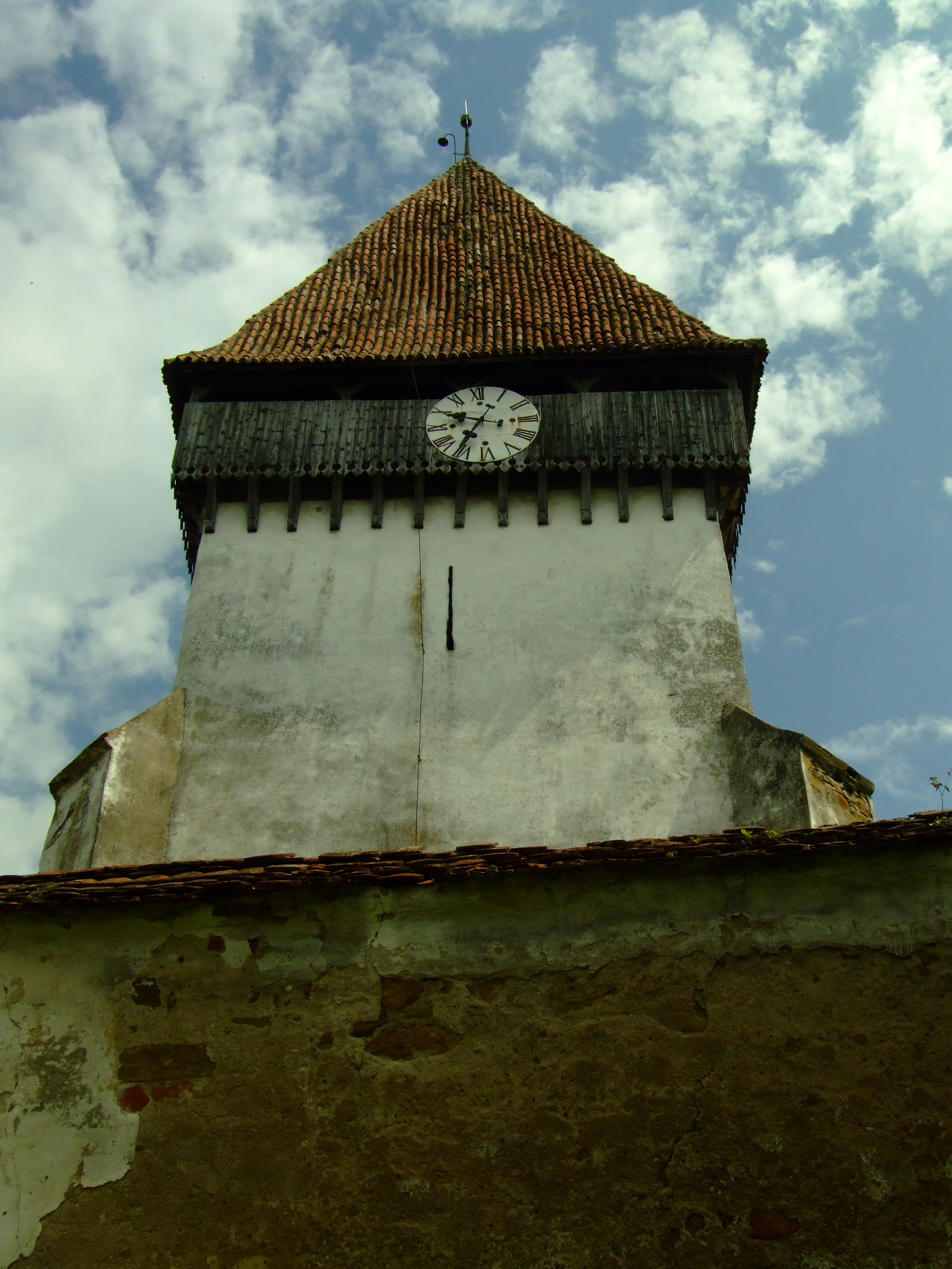 Biserica fortificată din Merghindeal